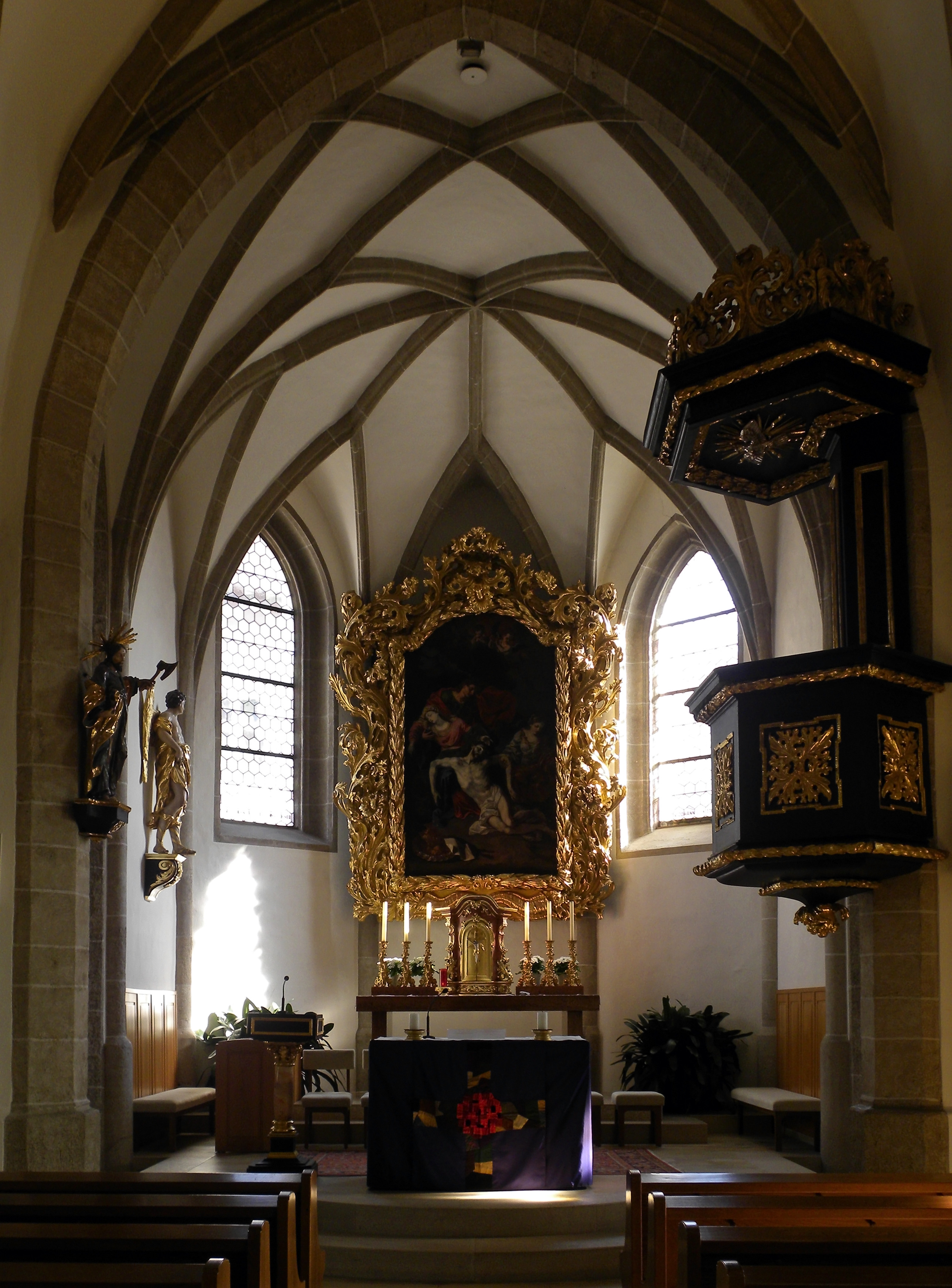 Kath. Pfarrkirche St. Magdalena und ehem. Friedhof